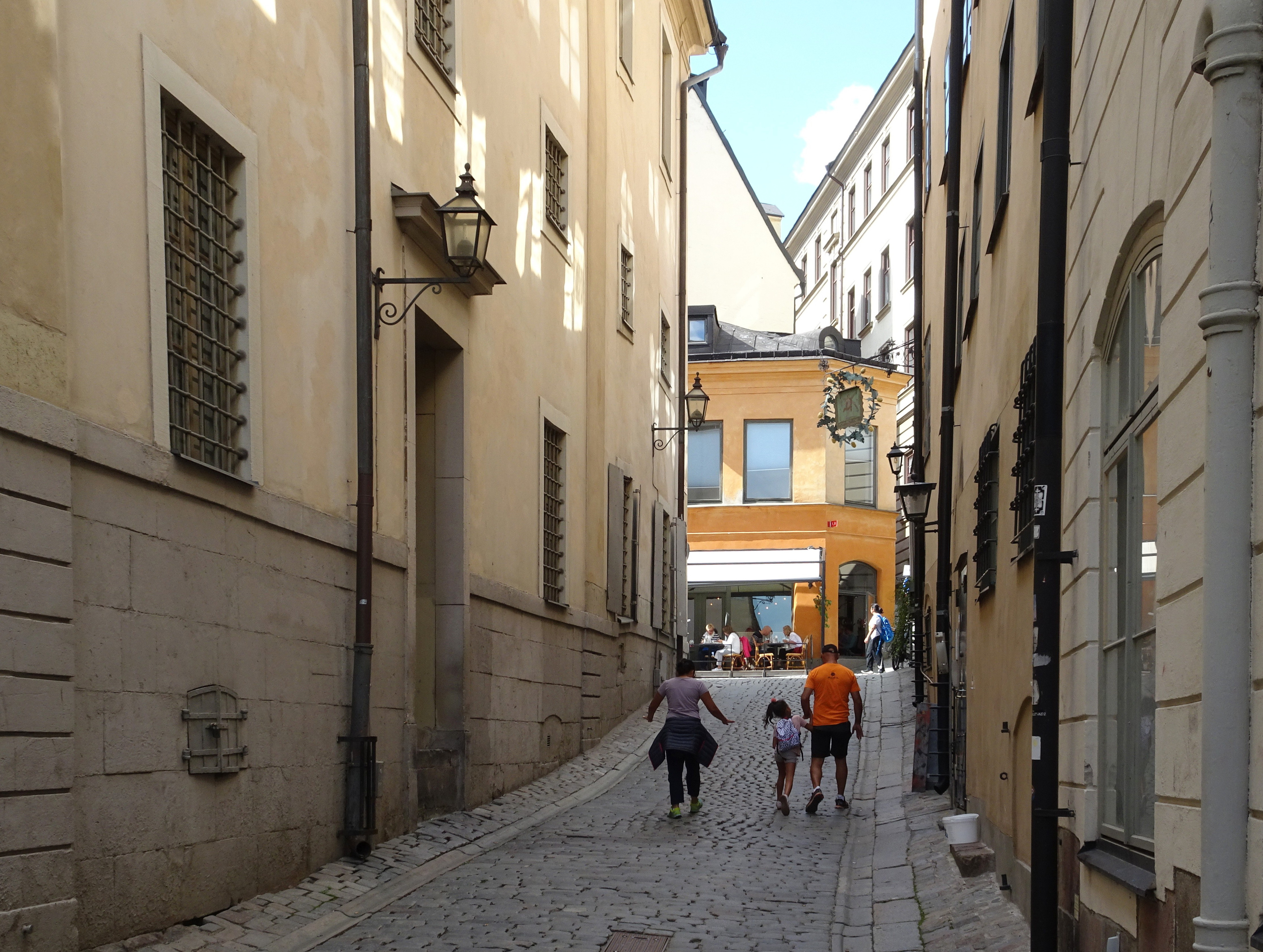 Tullgränd mot norr